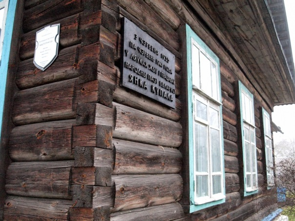 Беларуская (тарашкевіца): Мясьціны жыцьця і творчасьці Я. Купалы: дом Я. Купалы, дом шафёра, лазьня, гаспадарчыя пабудовы, помнік Я. Купалу. в. Ляўкі This is a photo of Belarusian heritage monument. Reference number: 213Б000134 ( WLM)